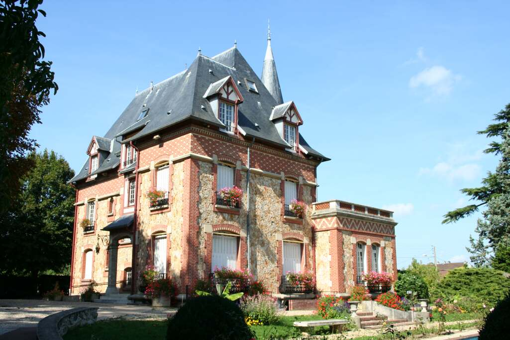 Mairie d'Orgeval - Yvelines (France)